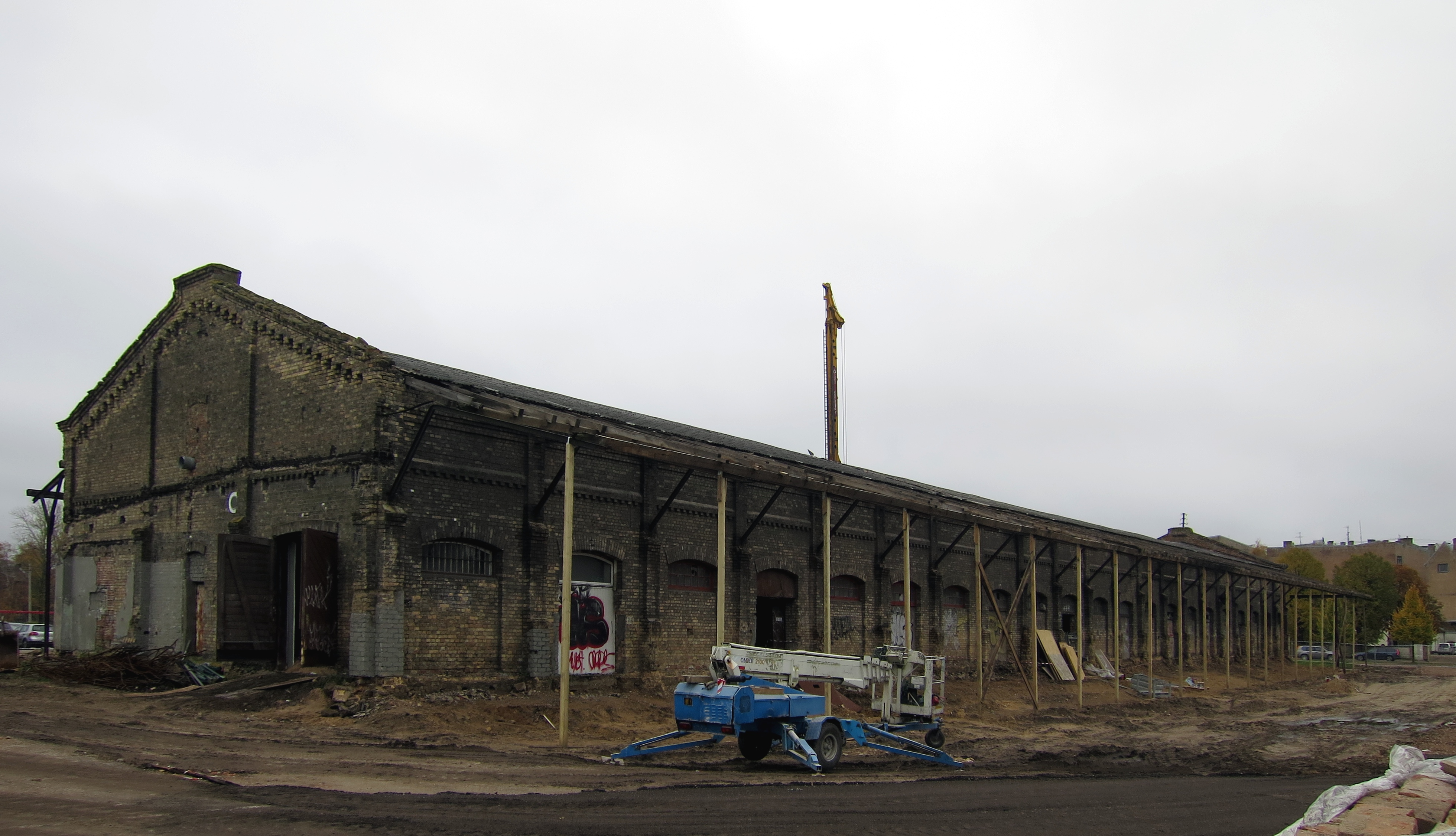 Bijušās Rīgas Preču stacijas noliktavas ēka pārbūves laikā